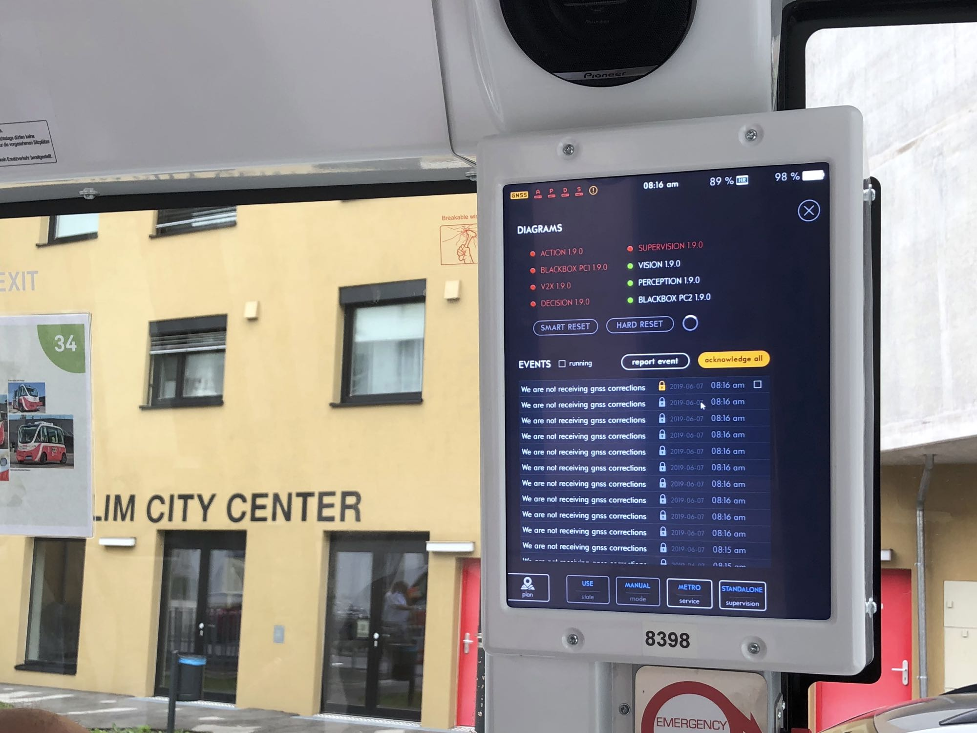 Navya teilautonomer Bus zeigt nach Ausfall fehlende GNSS Verbindung an